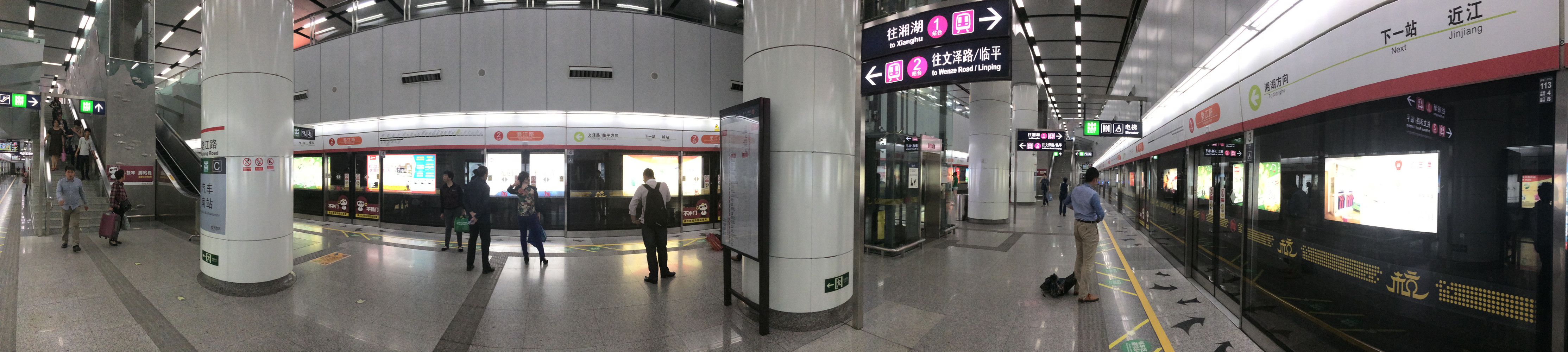 地铁1号线婺江路站站台全景